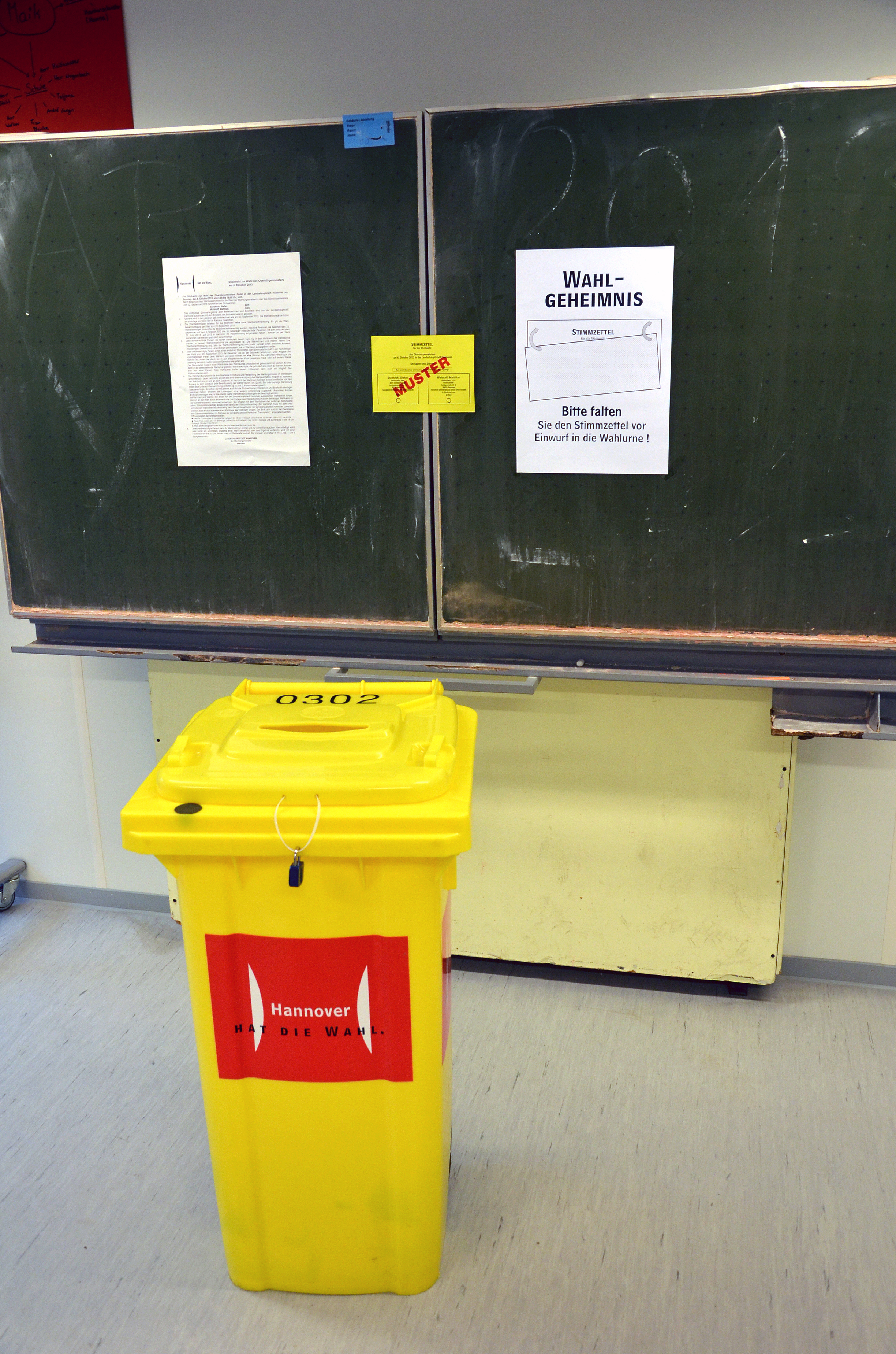 Zur Stichwahl für die Wahl des Oberbürgermeisters von Hannover hatten die BürgerInnen der Stadt die Wahl zwischen Stefan Schostok (SPD), der im ersten Wahlgang zwei Wochen zuvor 48,9 Prozent aller abgegebenen und gültigen Stimmen erhalten hatte, sowie Matthias Waldraff (CDU), der zuvor 33,8 Prozent erhalten hatte ...